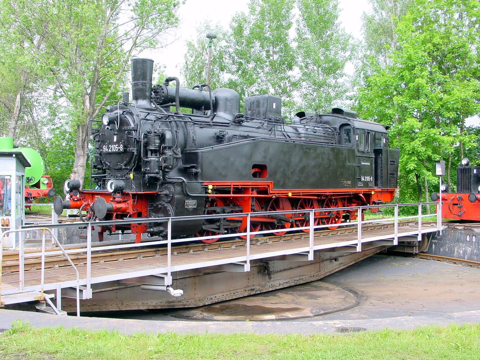 Dampflokomotive 94 2105 auf der Drehscheibe des Eisenbahnmuseums in Schwarzenberg/Erzgebirge.